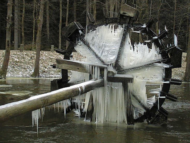 Vereistes Wasserschöpfrad im Waldnabtal